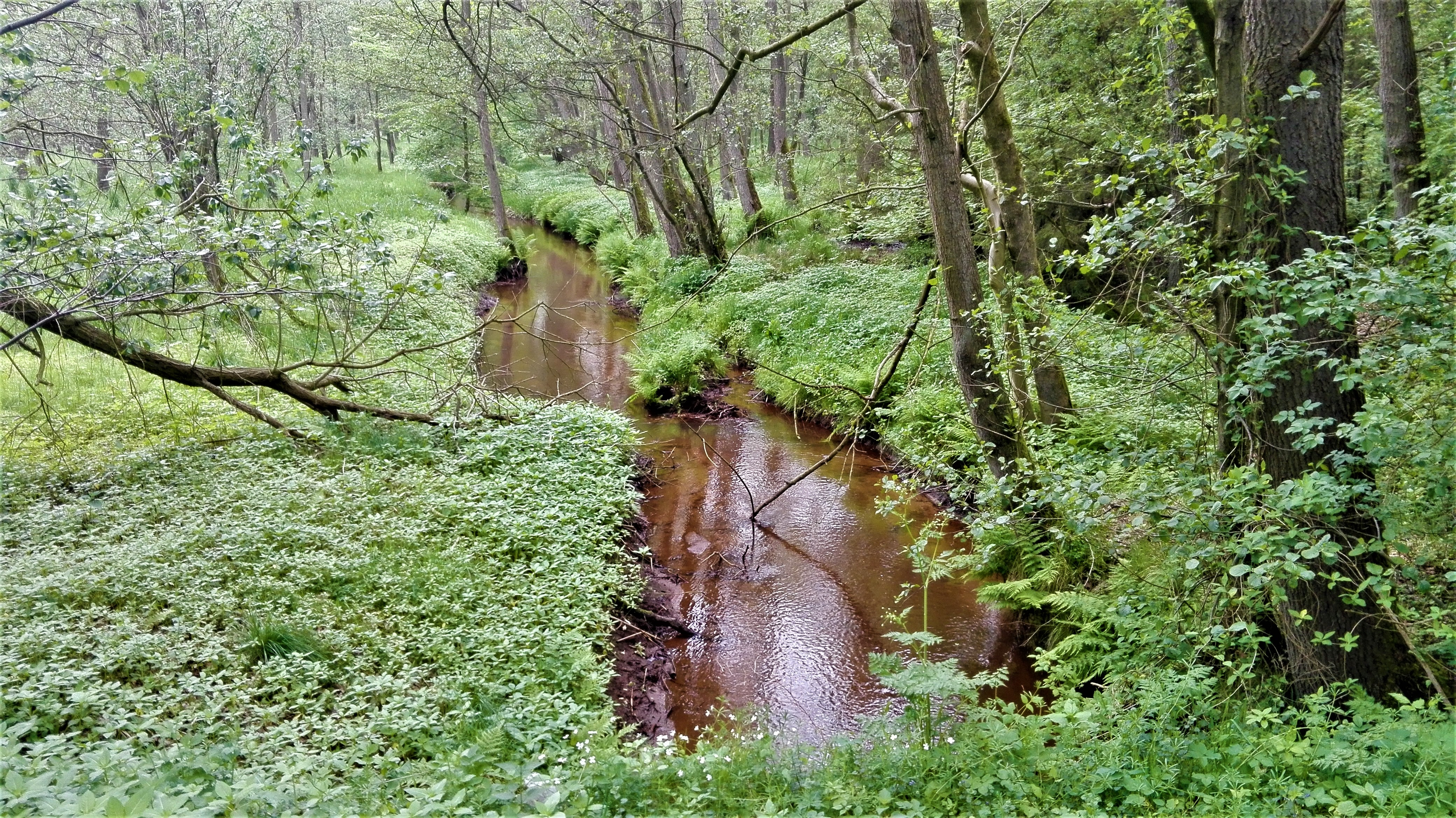 Hache am südlichen Ende des Freidorfer Hachetals